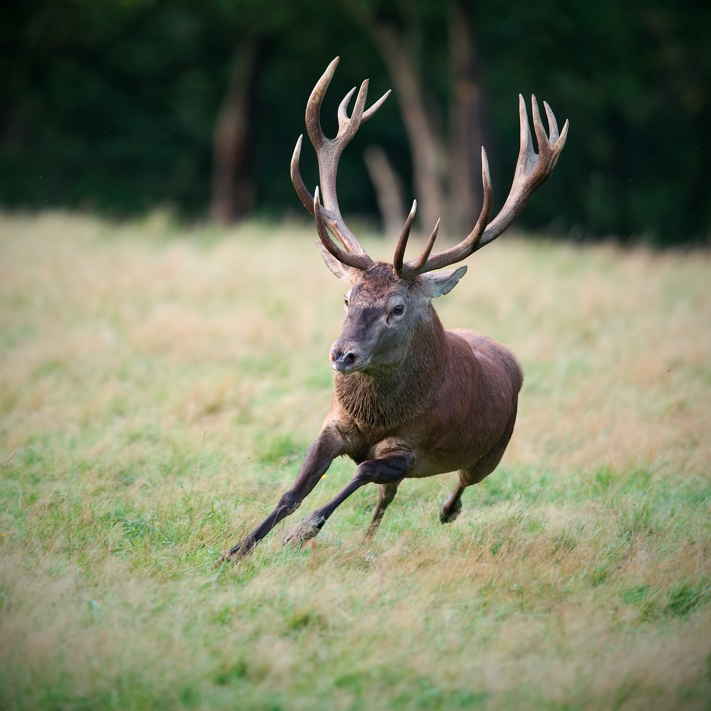 Jelen lesní